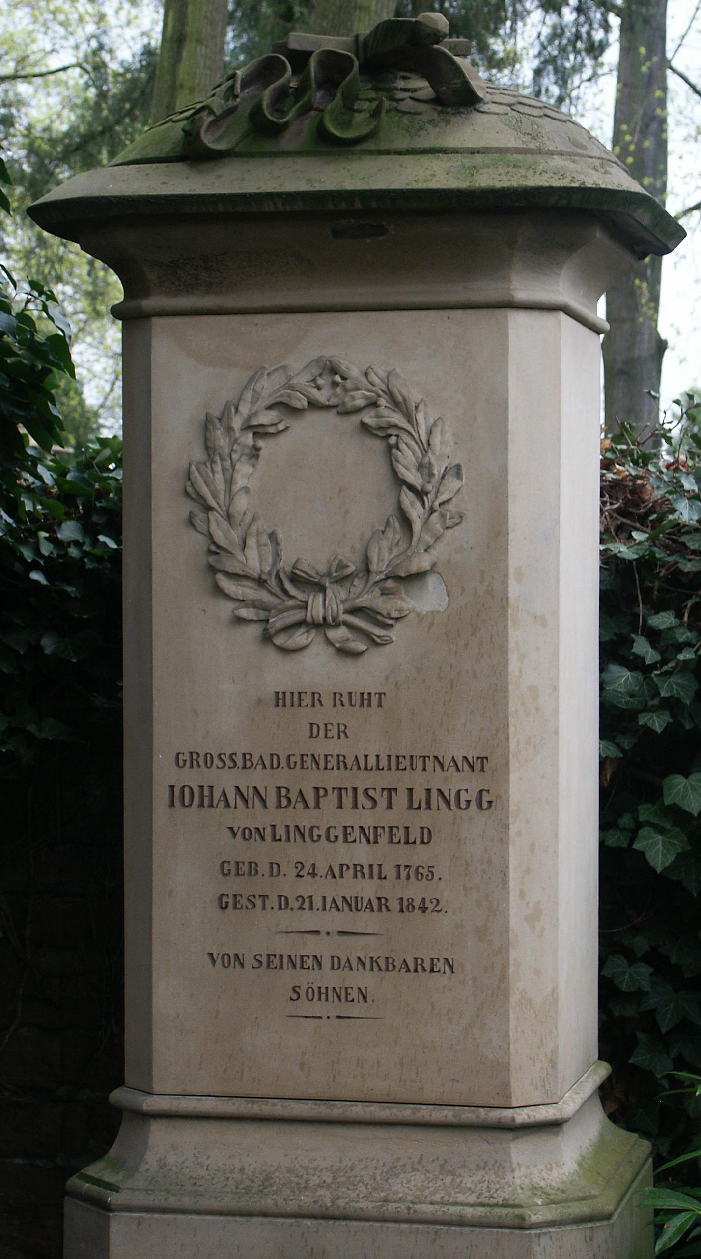 Grabstein des Großherzoglich-badischen Generalleutnants Johann Baptist Lingg von Linggenfeld (* 24. April 1765 in Meersburg, † 21. Januar 1842 in Mannheim) auf dem Mannheimer Hauptfriedhof